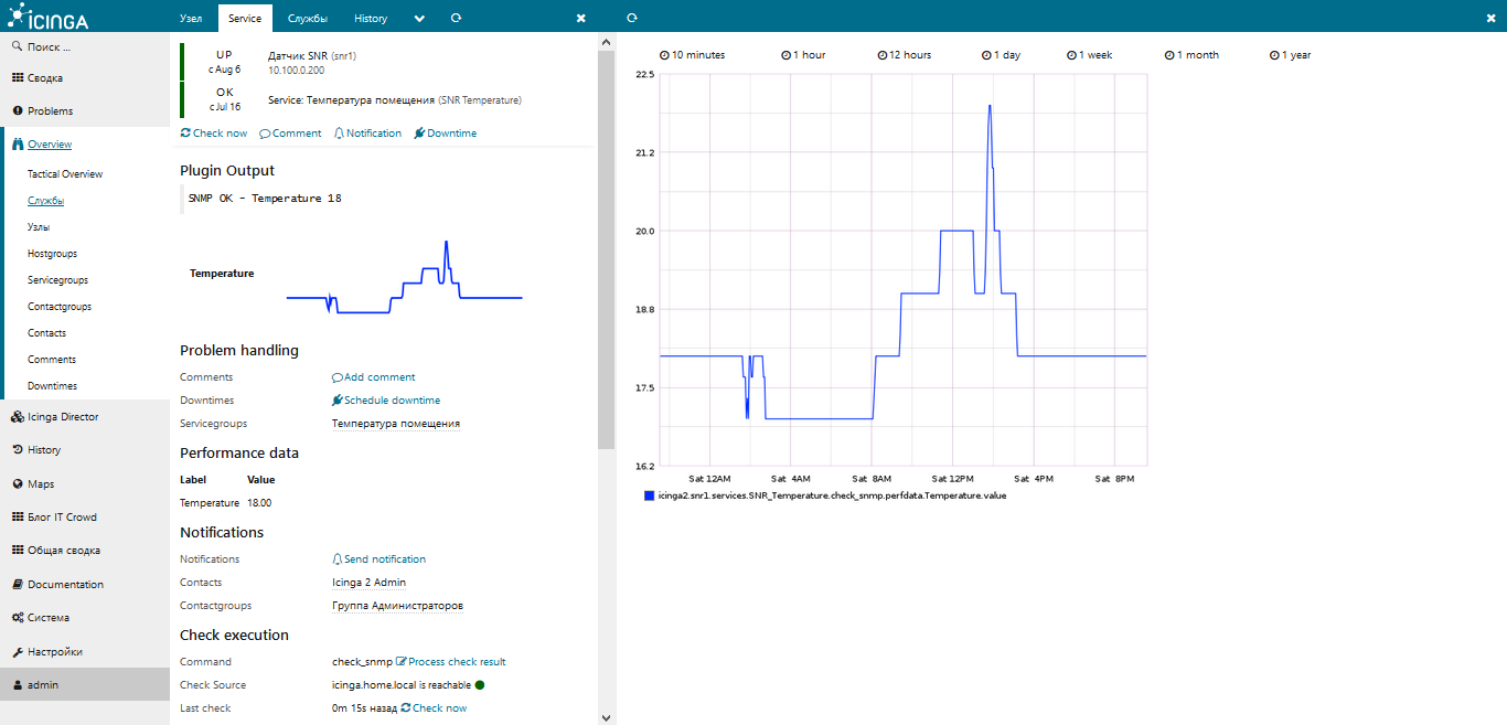 Icinga2 с модулем Graphite